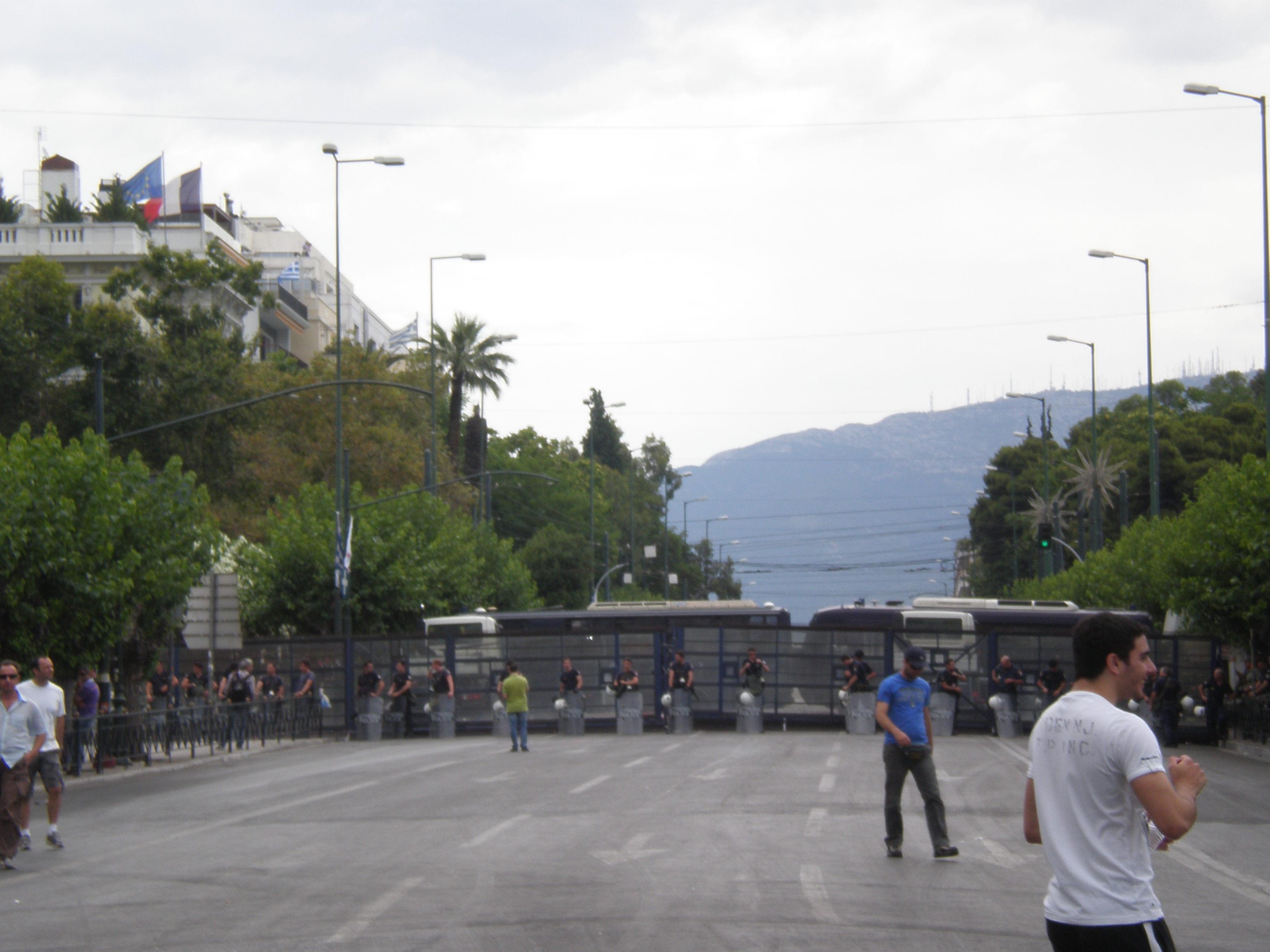 Αποκλεισμός της Βασιλίσσης Σοφίας μπροστά από τη Βουλή...